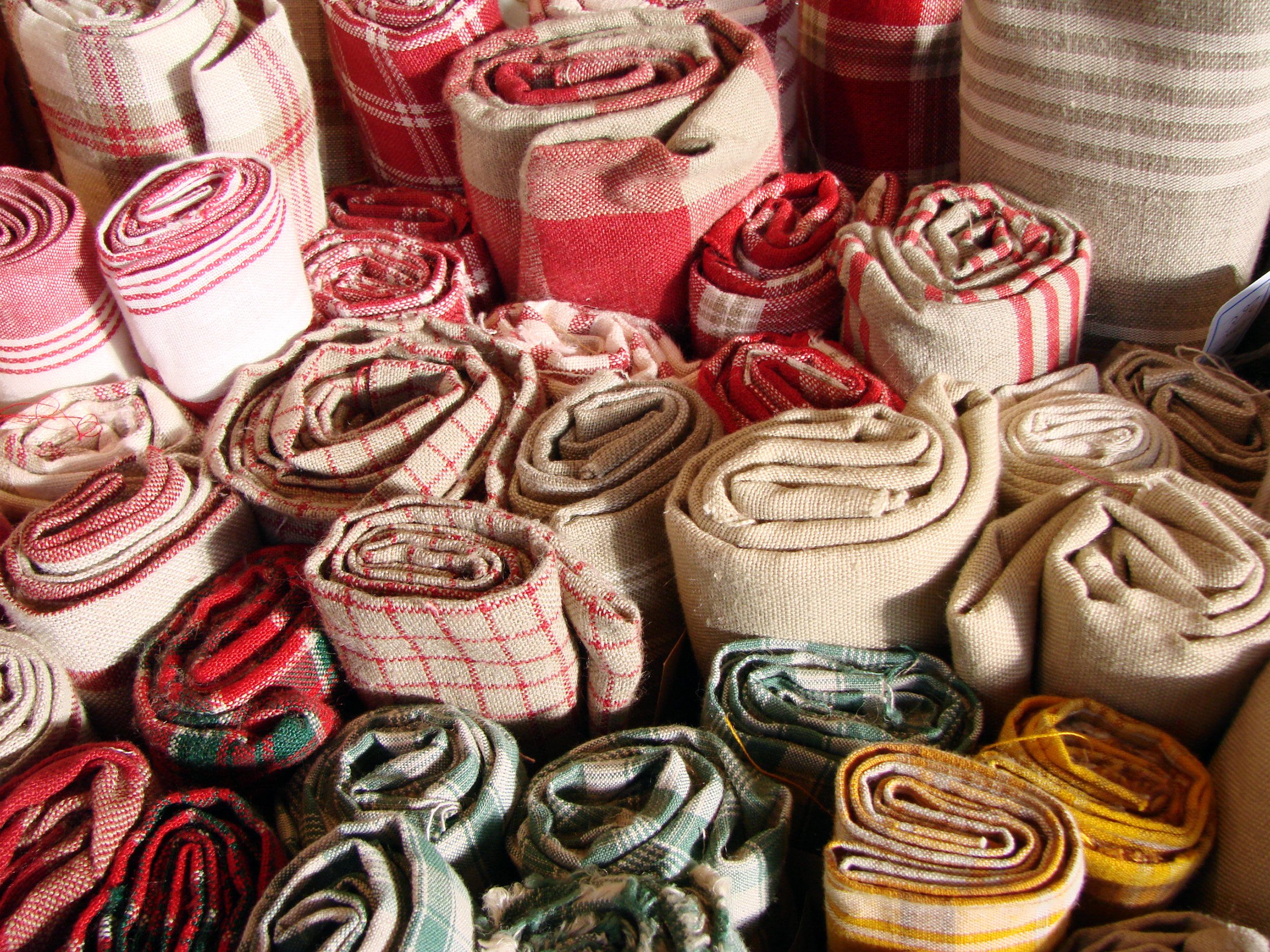 Linen rolls